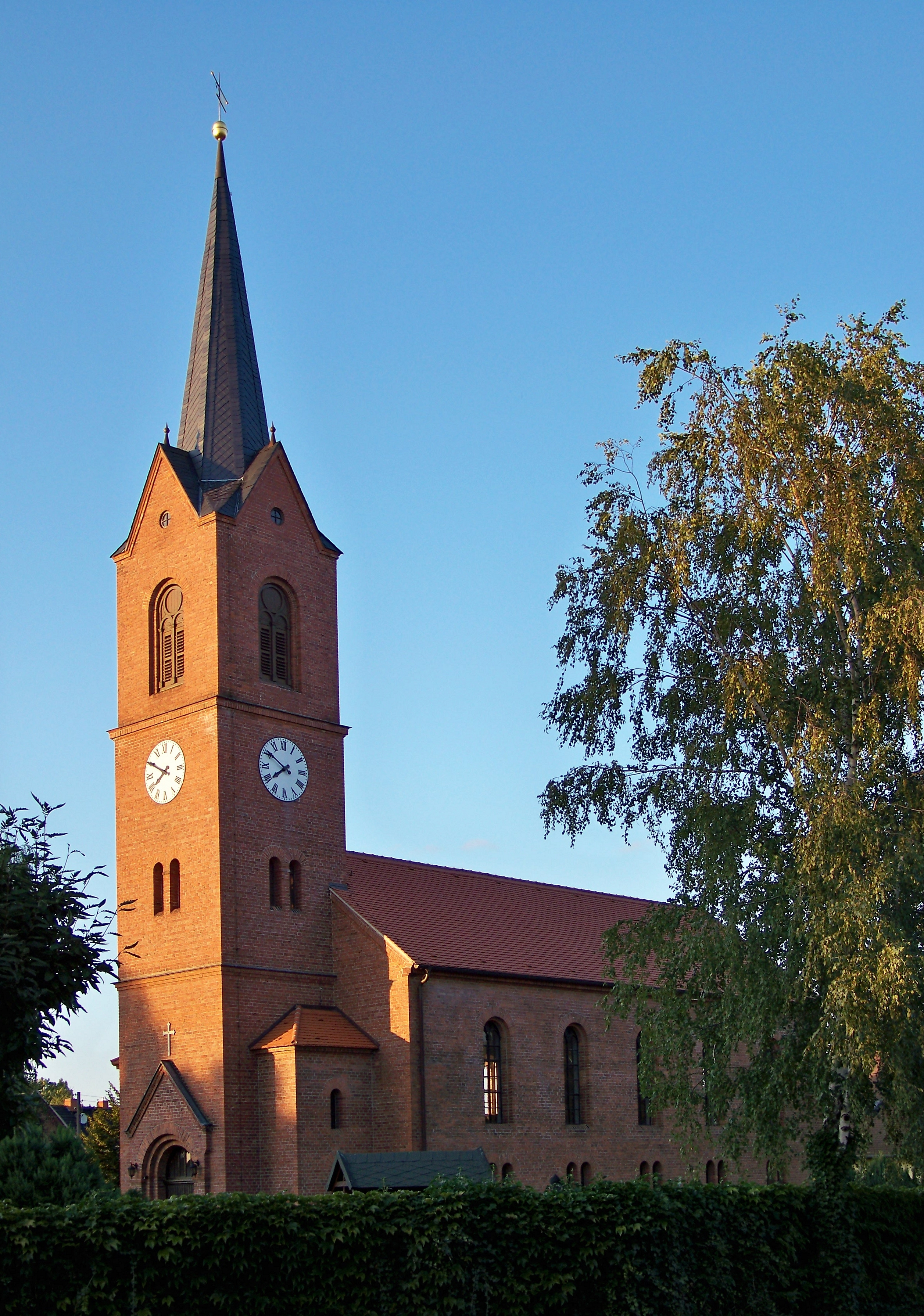 St. Matthäuskirche in Zschepplin, Ortsteil Naundorf, bei Eilenburg in Sachsen, Deutschland; gesehen an der Ecke Hauptstraße/Krippehnaer Landstraße Baujahre: 1867 und 1868 Baumaterial: Backstein